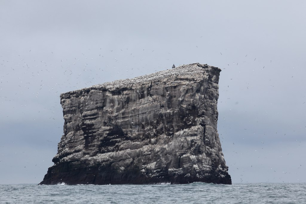 Eldey